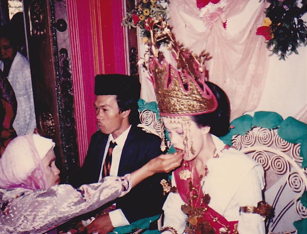 Pengantin dari suku Lampung. Foto ini diambil pada Agustus 1987. Kedua Mempelai merupakan Pengantin dari Suku Lampung Marga Sungkai Bungamayang. Siger adalah Mahkota Pengantin Suku Lampung yang sangat umum digunakan.(Sumber Dokumen Pribadi Adi Yuza)